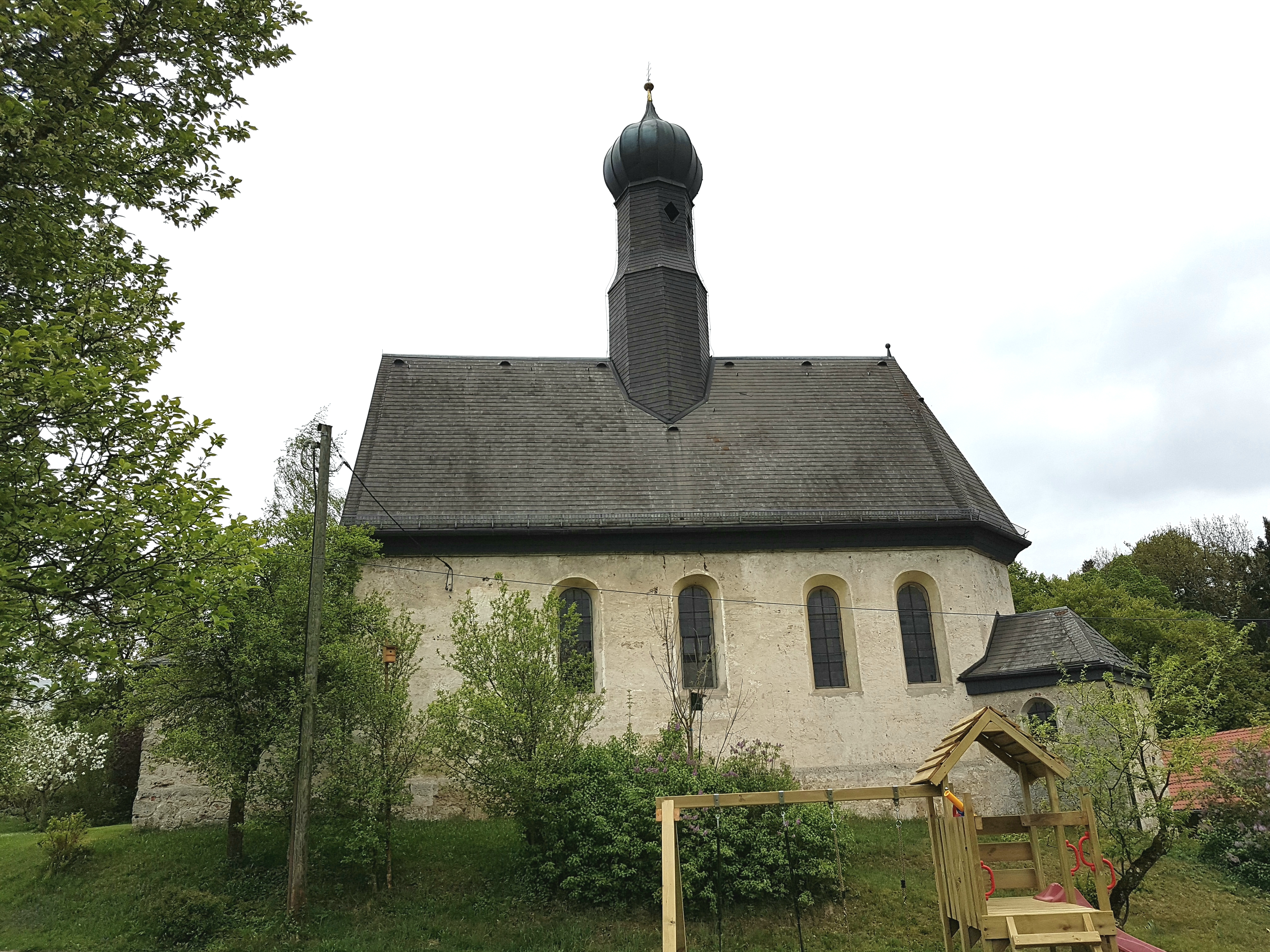 Mitteraufham (Feldkirchen-Westerham), Kirche St. Magdalena, spätgotischer Bau des 15. Jahrhundert der im 18. Jahrhundert umgestaltet wurde. Dabei erhielt er den hölzernen Mittel-Dachreiter. in Langhausfenster 2 Glasgemälde von 1584.